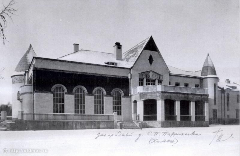 Особняк Патрикеева в Космодемьянском. Архитектор Ф. О. Шехтель, 1907-1909